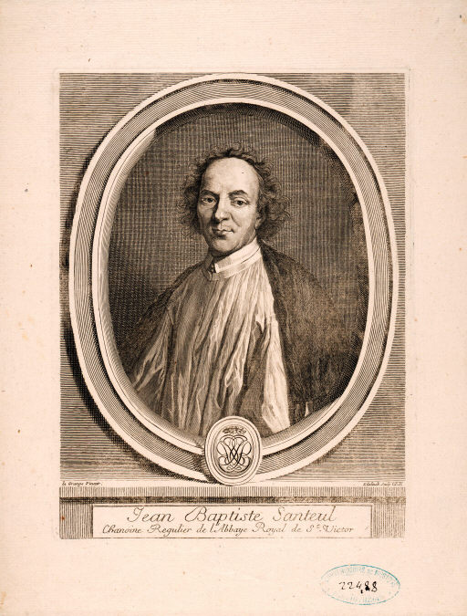 Portrait of French poet Jean de Santeul (aka Jean-Baptiste Santeuil Jean-Baptiste Santeul or Santolius) (1630-1697).